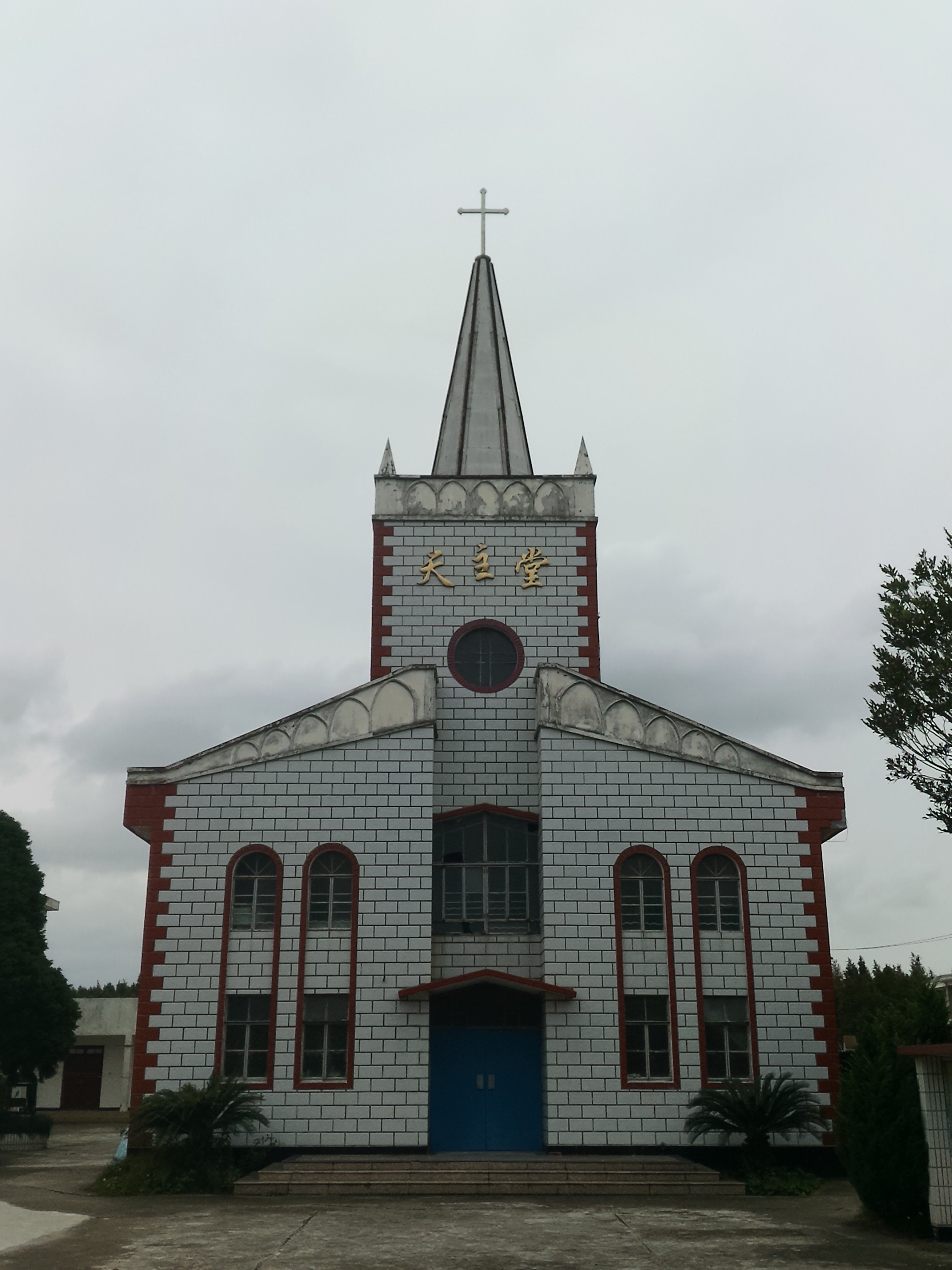 横沙天主堂